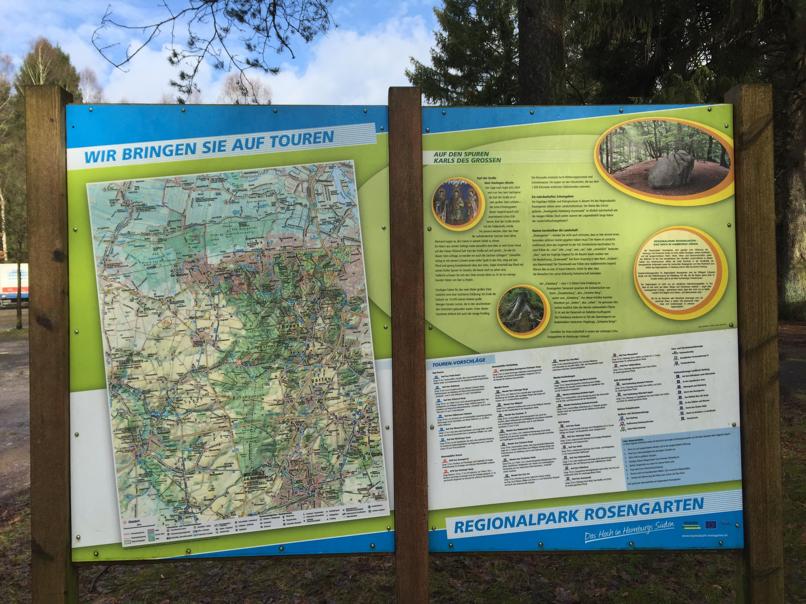 Rastplatz Karlstein bei Schwiederstorf